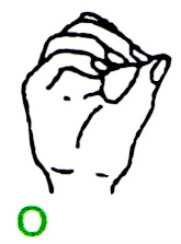 Buchstabe O im deutschen Fingeralphabet, gemäß einer Infokarte des Landesverbandes Bayern der Gehörlosen e.V. (